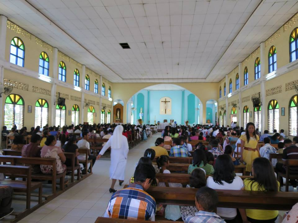 Kirche von Aimutin, Comoro, Dili